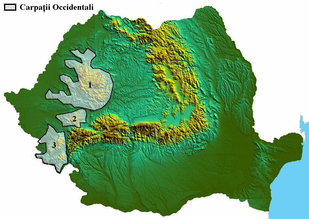 Carpaţii Occidentali